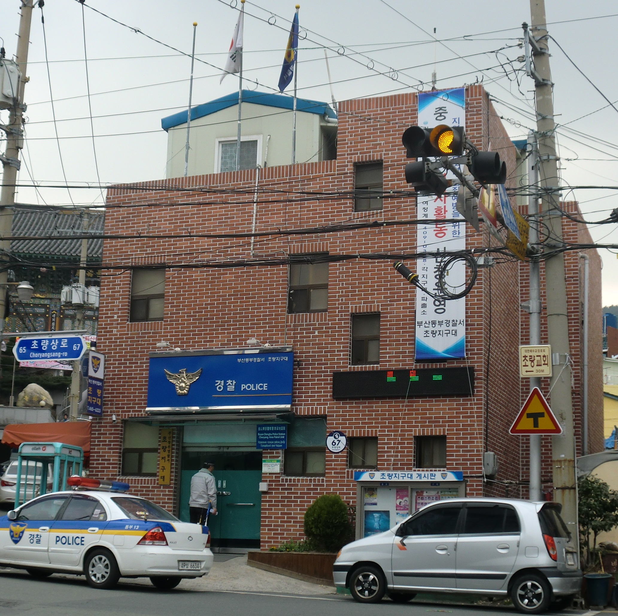 부산광역시 동구에 있는 부산동부경찰서 초량지구대